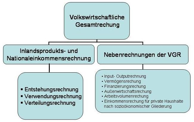 Teilbereiche der VGR